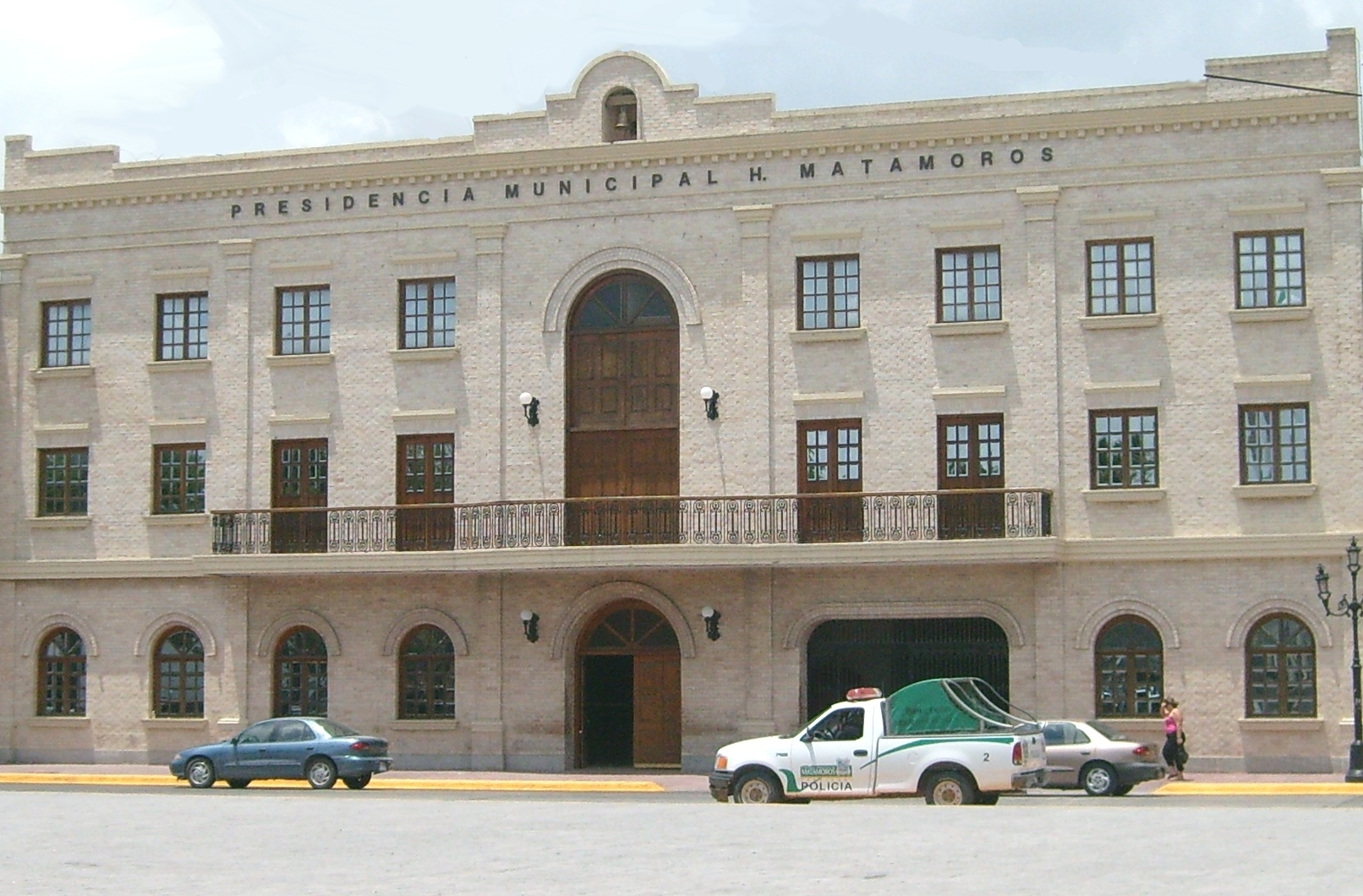 Matamoros Municipal Palace